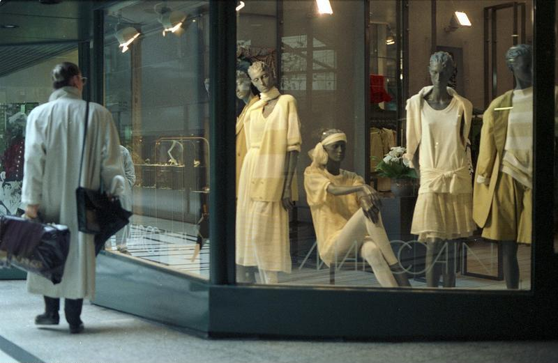 Juni 1988 Stuttgart, Calwer Passage